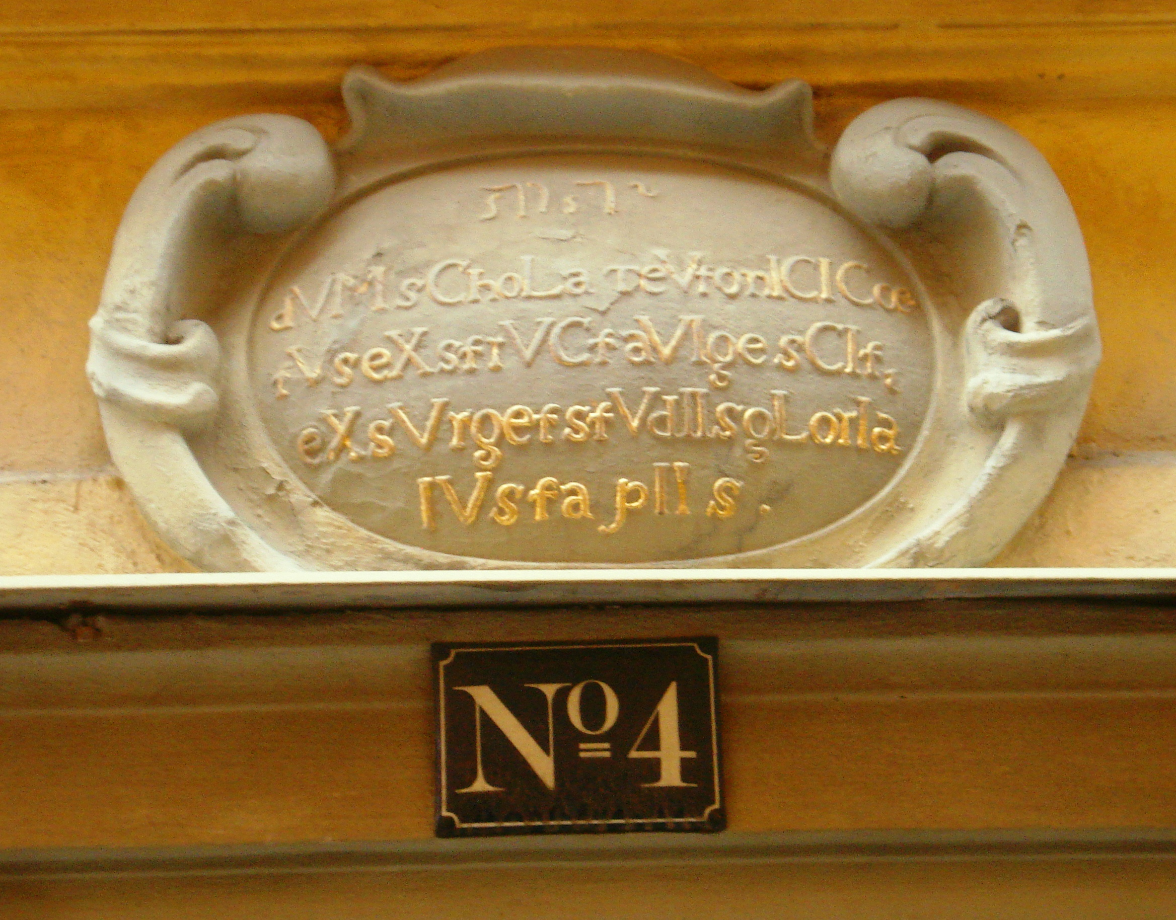 Deutsche Schule Stockholm, Tyska Skolgränd 4, Lateinische Inschrift über der Hausnummer